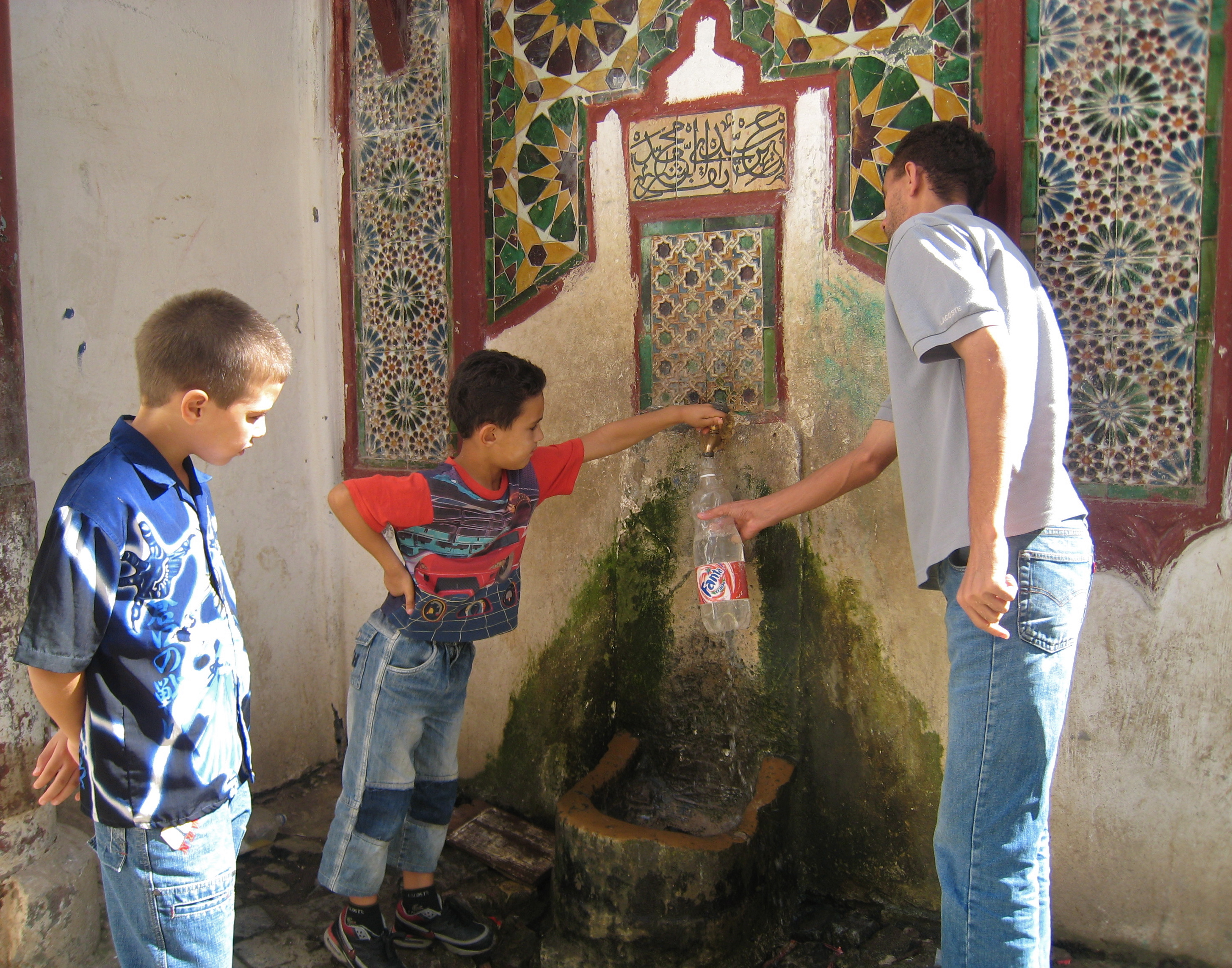 Approvisionnement en eau dans la haute Casbah Alger